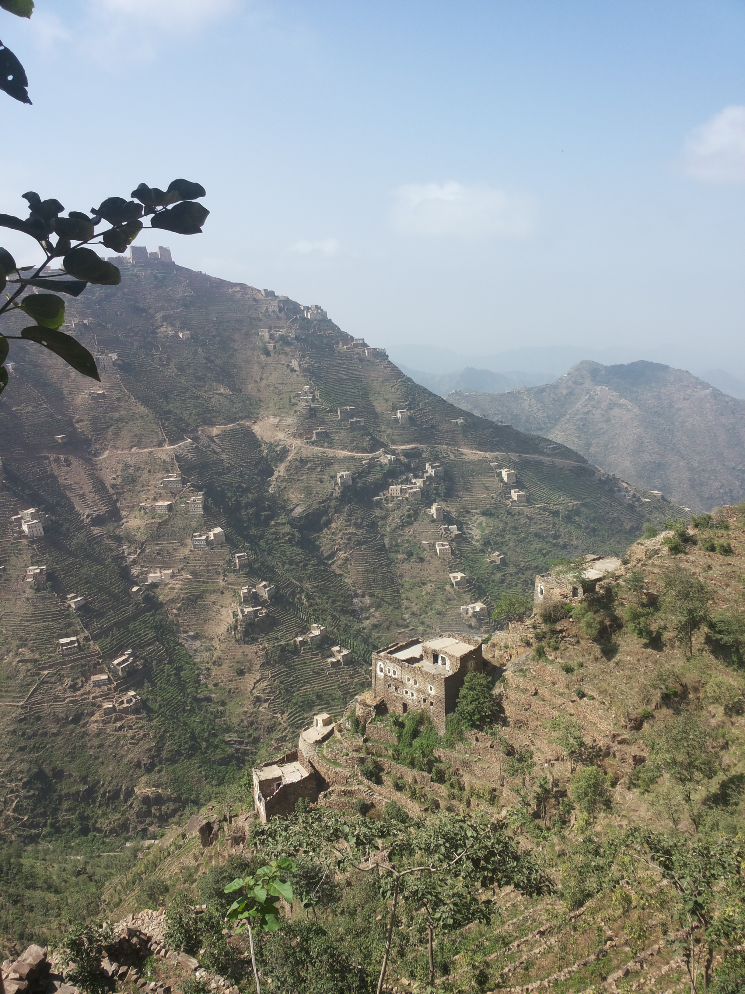 عزلة بني سعيد